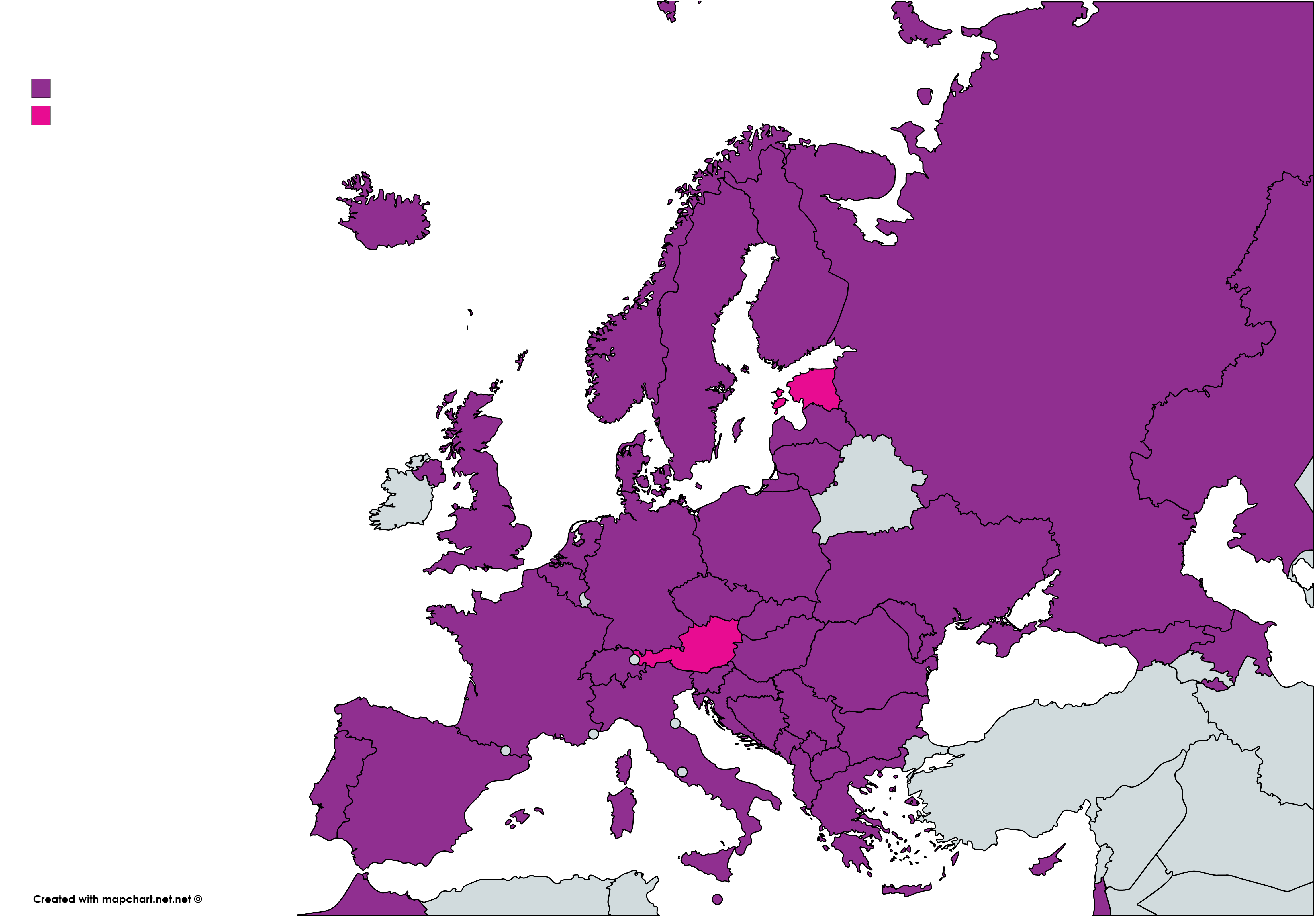 Wizz Air sihtkohad